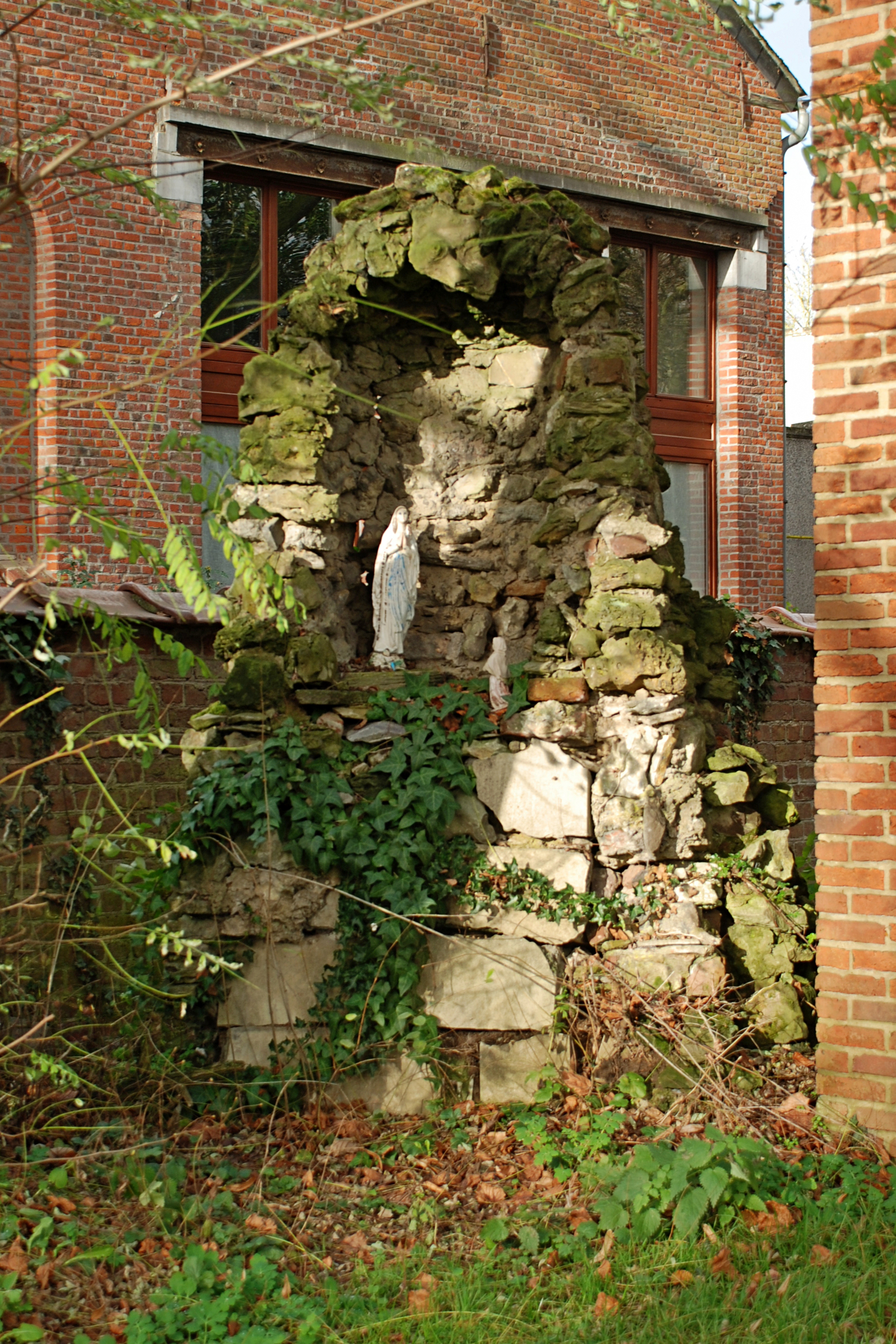 Belgique - Brabant wallon - Ottignies-Louvain-la-Neuve - Place Communale de Céroux